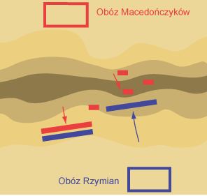 Bitwa pod Kynoskefalaj (197 pne)- 2 faza